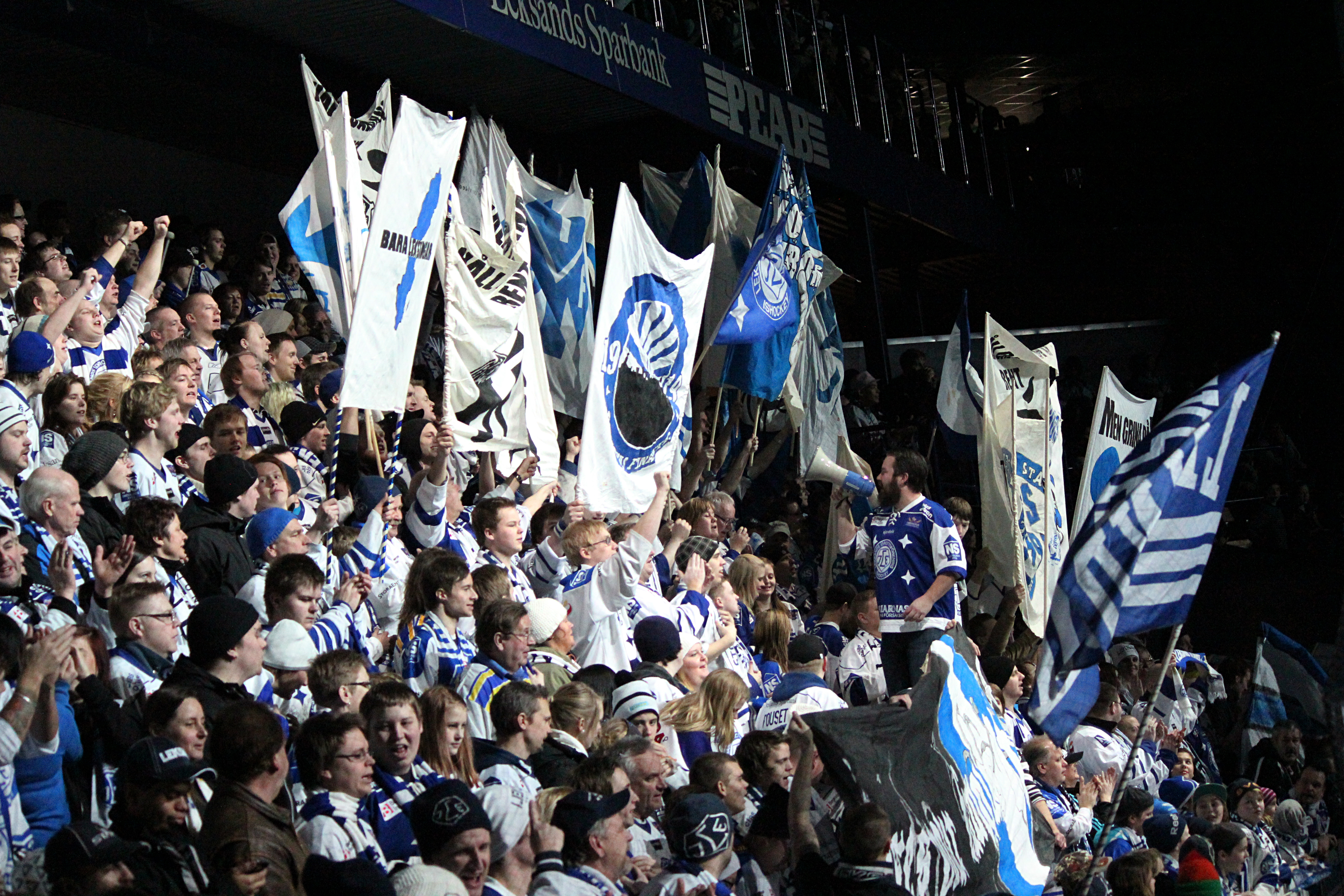 Leksands IF:s hemmaklack i matchen mot VIK Västerås HK 2011-01-29.